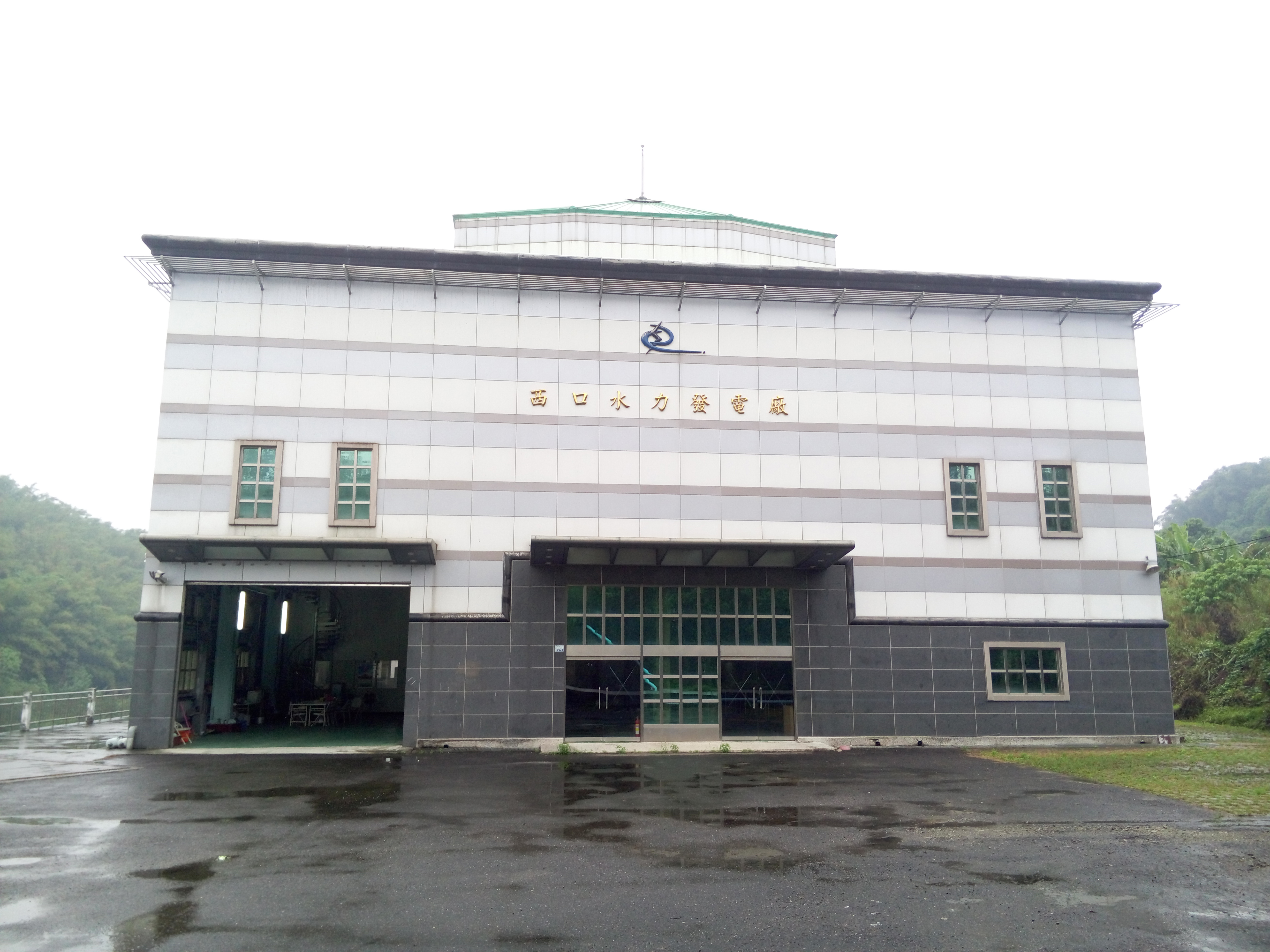 西口水力發電廠廠房外觀